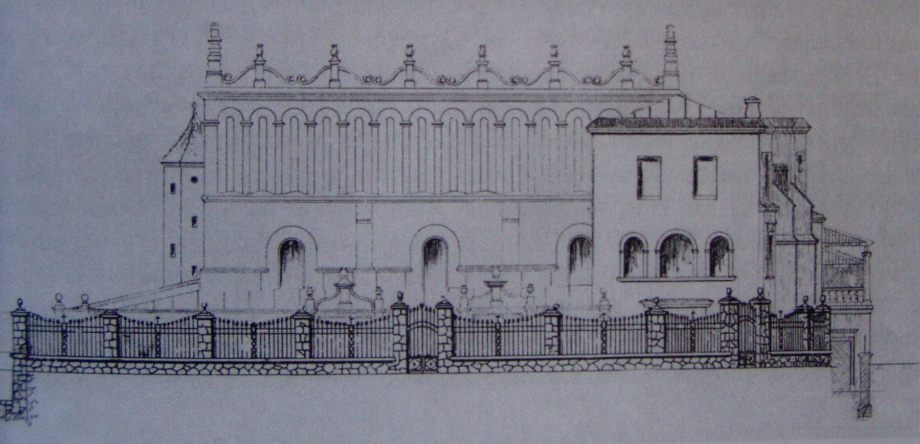 Projekt ogrodzenia wokół fasady Starej Synagogi w Krakowie